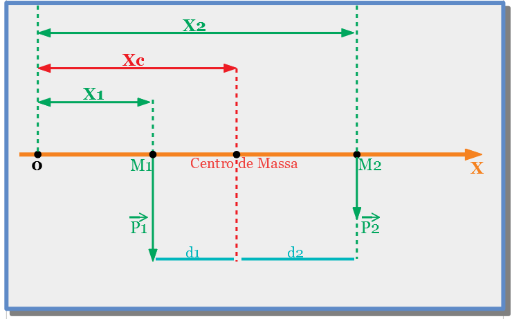 O diagrama fornece aspectos sobre o Momento Linear de duas partículas contidas em um sistema, revelando o ponto de equilíbrio entre elas no eixo X de um plano cartesiano. Esse local é o Centro de Massa de um Momento Linear.